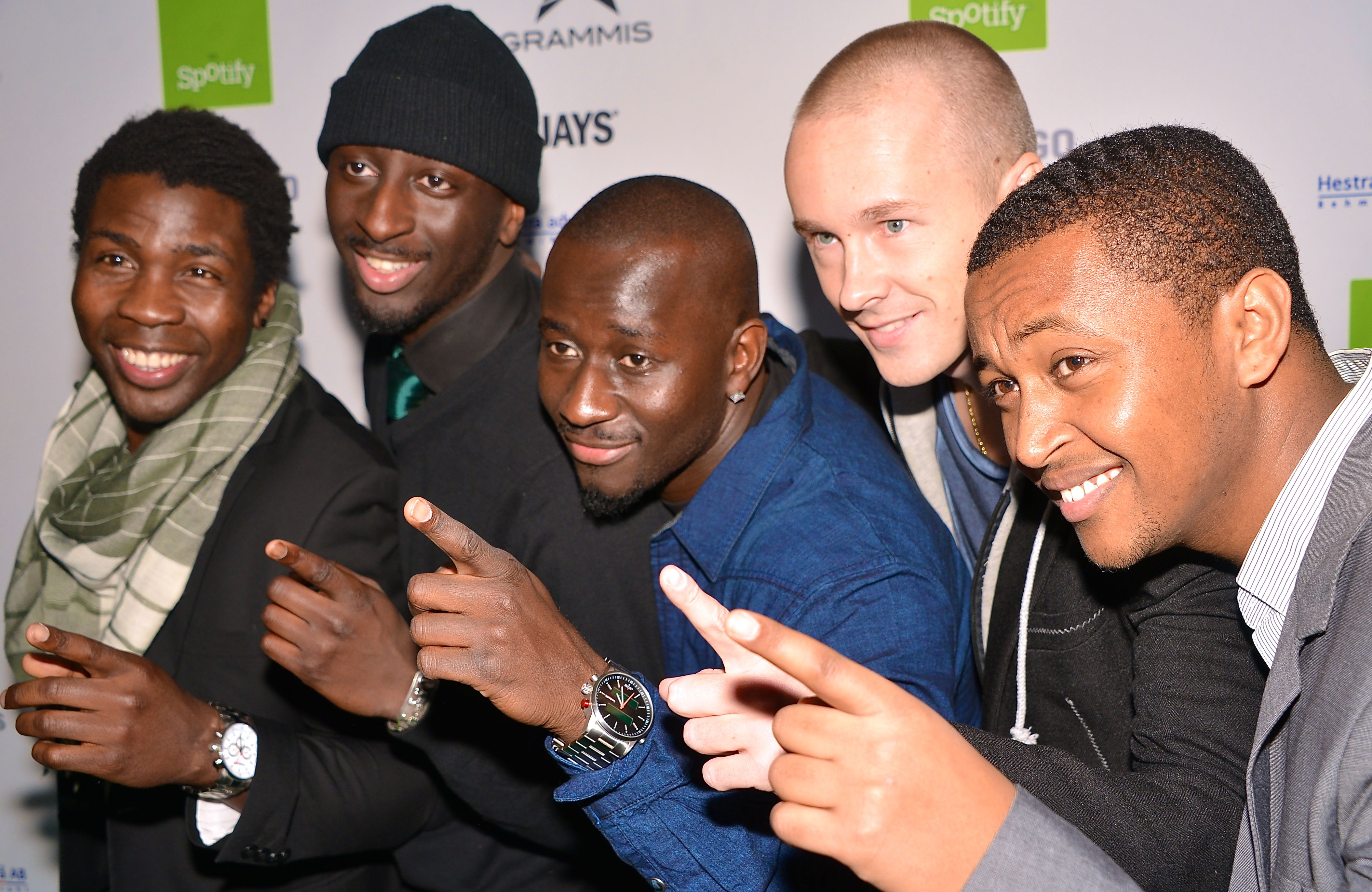 Panetoz på Grammisgalan på Cirkus, Stockholm den 20 februari 2013.